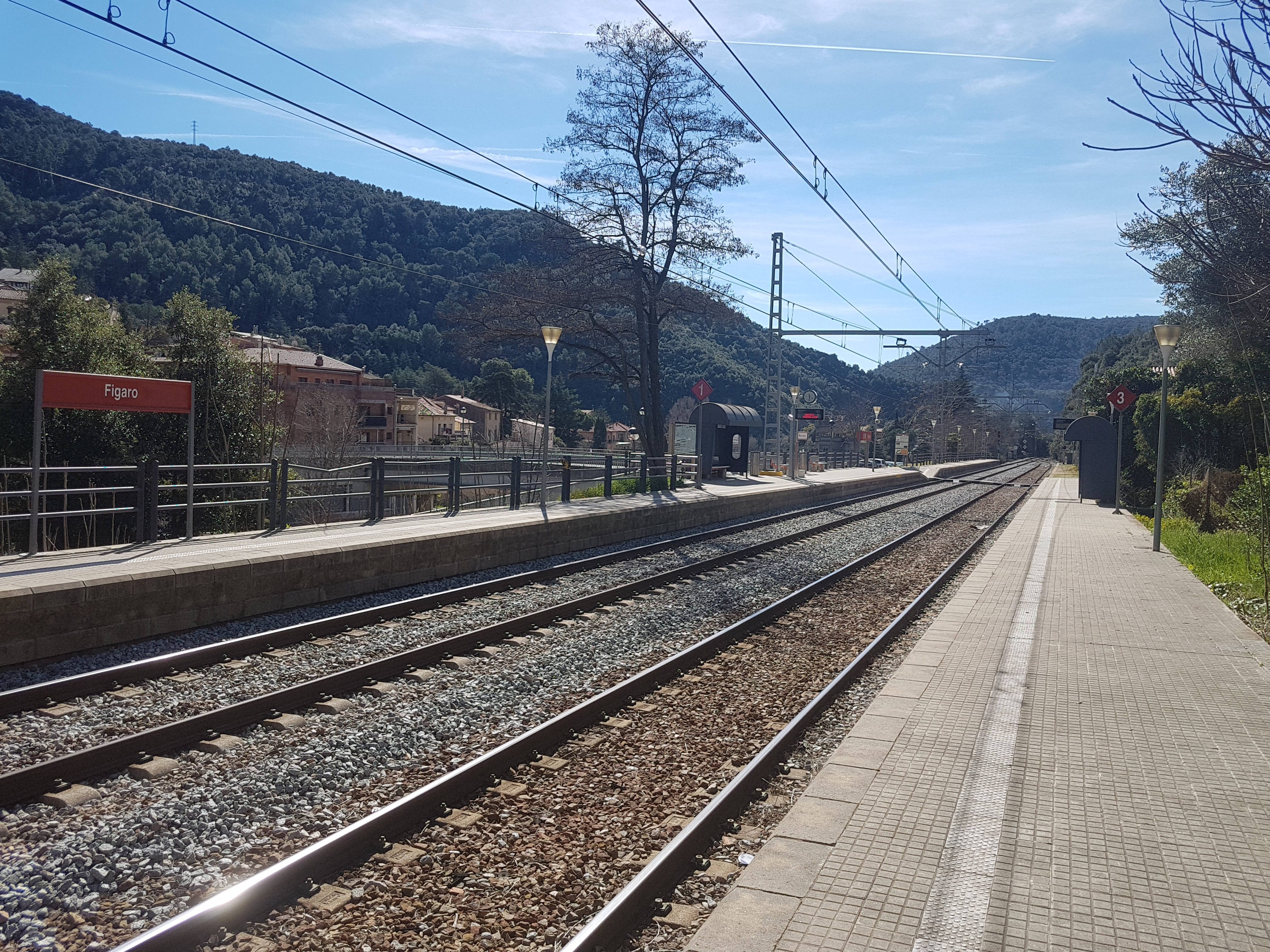 Estació de Figaró de la línia Barcelona-Ripoll. Vista entrada de l'estació des de La Garriga